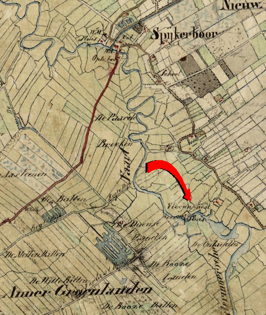 Detail van de militair topografische kaart uit 1852 met Spijkerboor en "'t Vlooien nest"